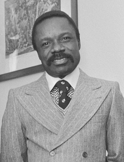 Koningin Juliana en prins Bernhard ontvangen president Omar Bongo van Gabon en zijn echtgenote op paleis Soestdijk. V.l.n.r. mevrouw Bongo, koningin Juliana, president Bongo en prins Bernhard